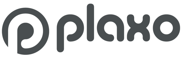 Logo des Unternehmens Plaxo